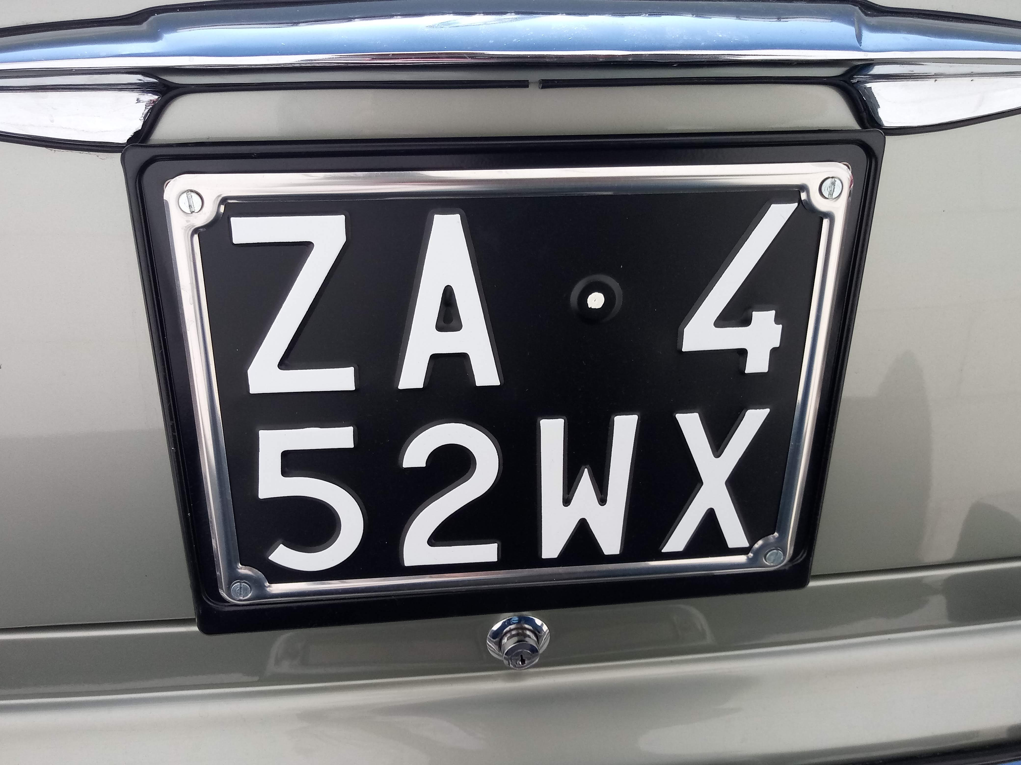 La foto rappresenta la targa posteriore con serie "ZA" con sistema attuale ma formato in uso dal 1963 al 1975; è applicata su una Lancia Flaminia degli anni '60 vista alla fiera di Padova il 26 ottobre 2019